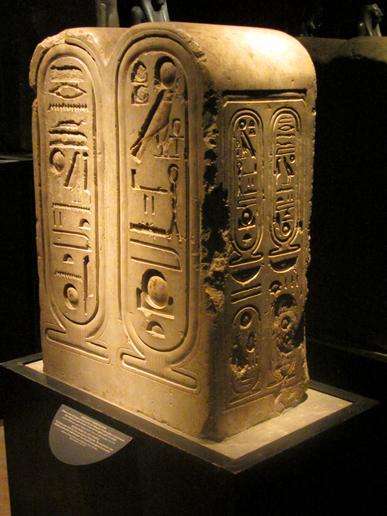 Geroglifici su Pietra al Museo Egizio di Torino ( parte 2 del museo)